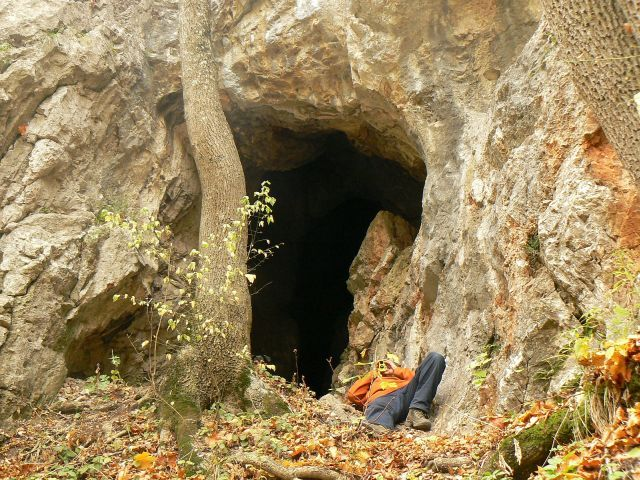 Kráľovská jaskyňa je najznámejšia jaskyňa v Zádielskej tiesňave, nie však najväčšia. Má dĺžku 17 m a korózny pôvod. Leží vo východnom svahu Zádielskej tiesňavy, resp. v západnom svahu Zádielskej planiny, v nadmorskej výške 420 m n. m. Spája sa s ňou legenda o uhorskom kráľovi Belovi IV. V Zádielskej tiesňave v súčasnosti poznáme približne 100 jaskýň.